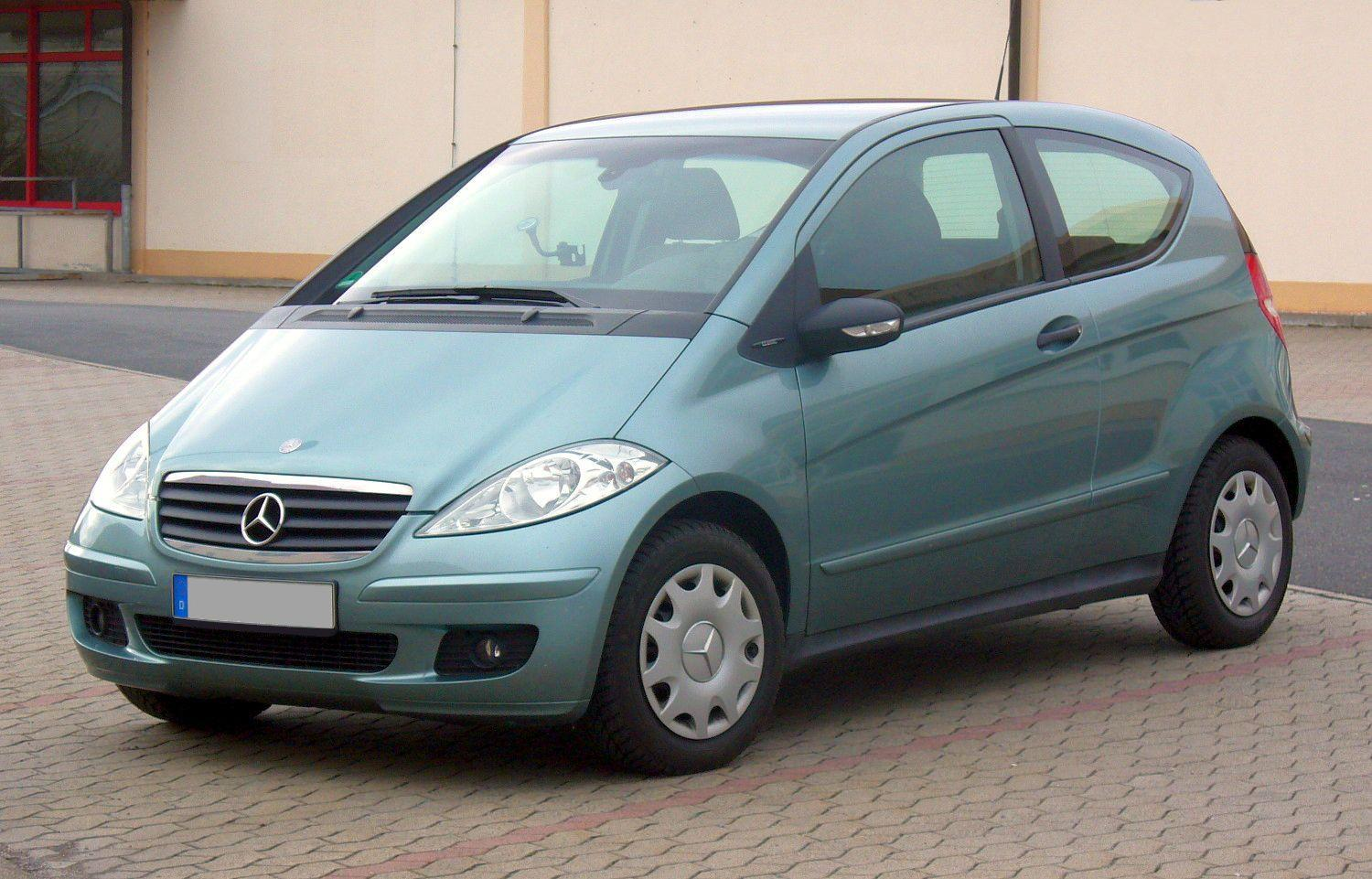 Mercedes-Benz C169 A150